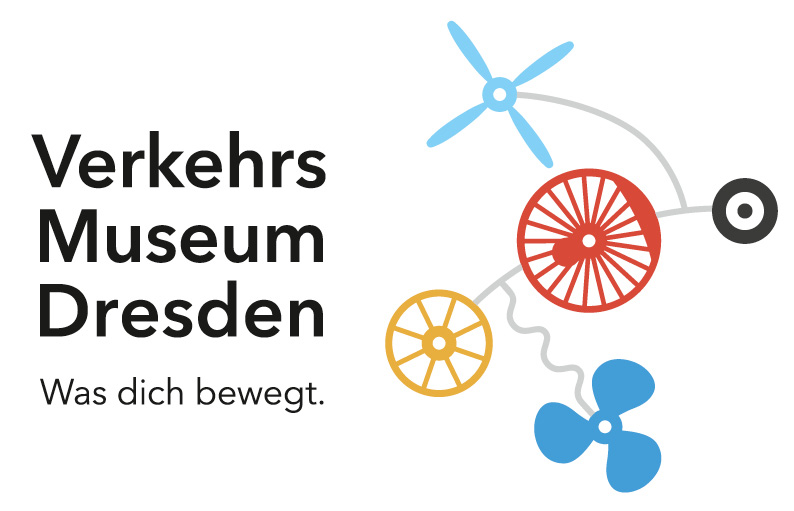 Logo des Verkehrsmuseums Dresden aus dem Jahr 2018